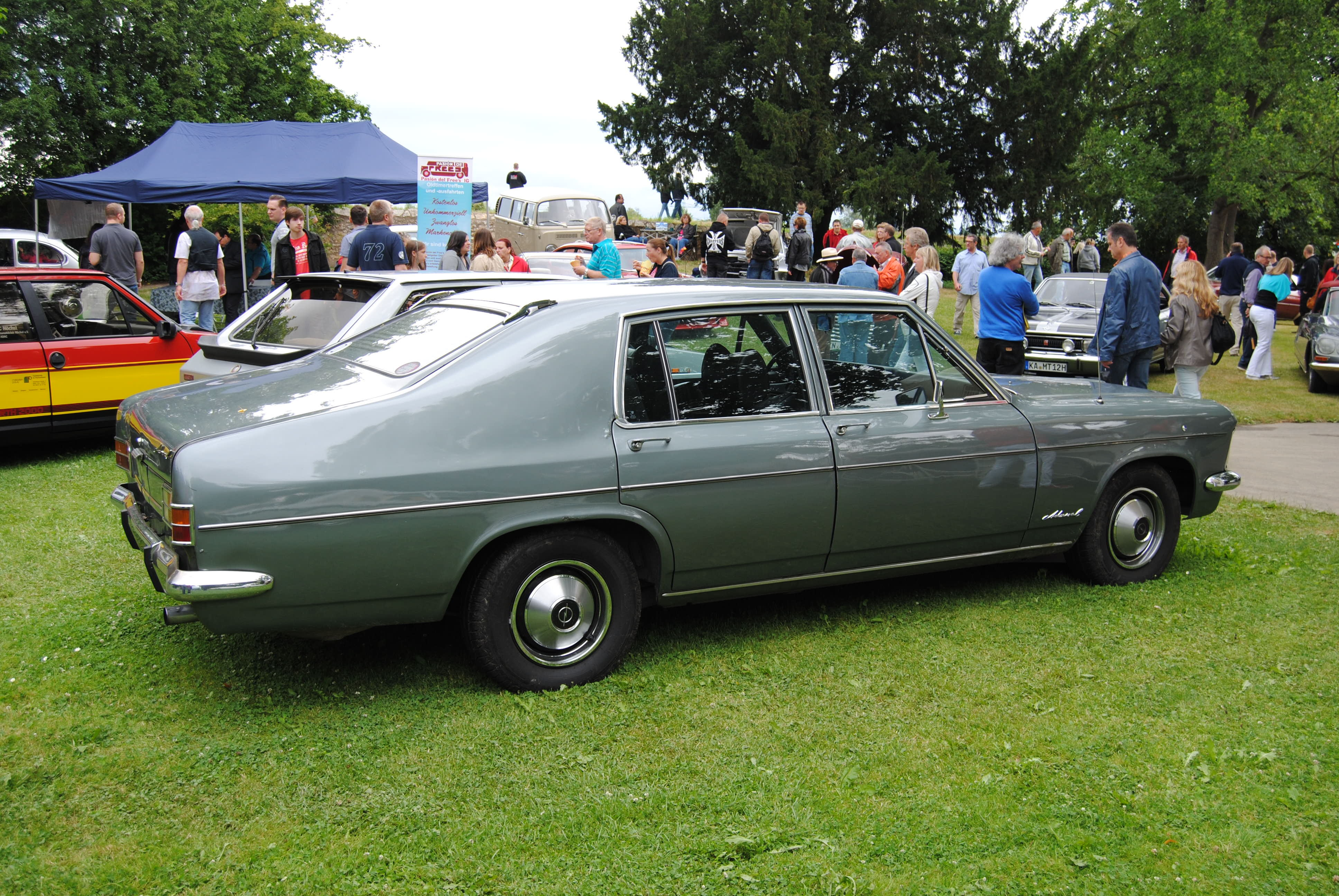 Opel Admiral B mit Schrägheck-Sonderkarosserie von Vogt, ursprünglich hergestellt für das ZDF, auf dem Klassikertreffen Rüsselsheim 2014.